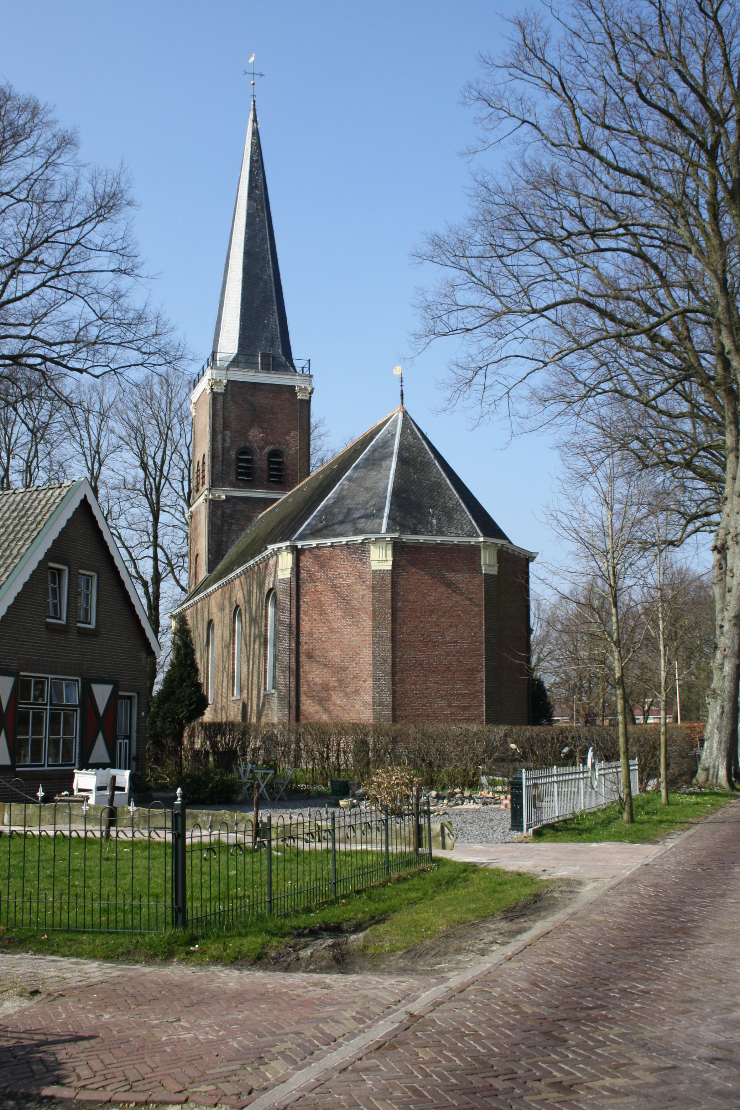 Langweer (Fr) NH kerk - Oasingaleane 13